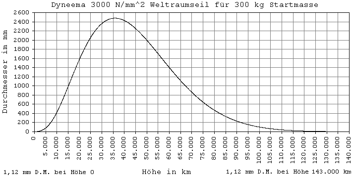 Seildurchmesser eines Dyneema Weltraumlifts